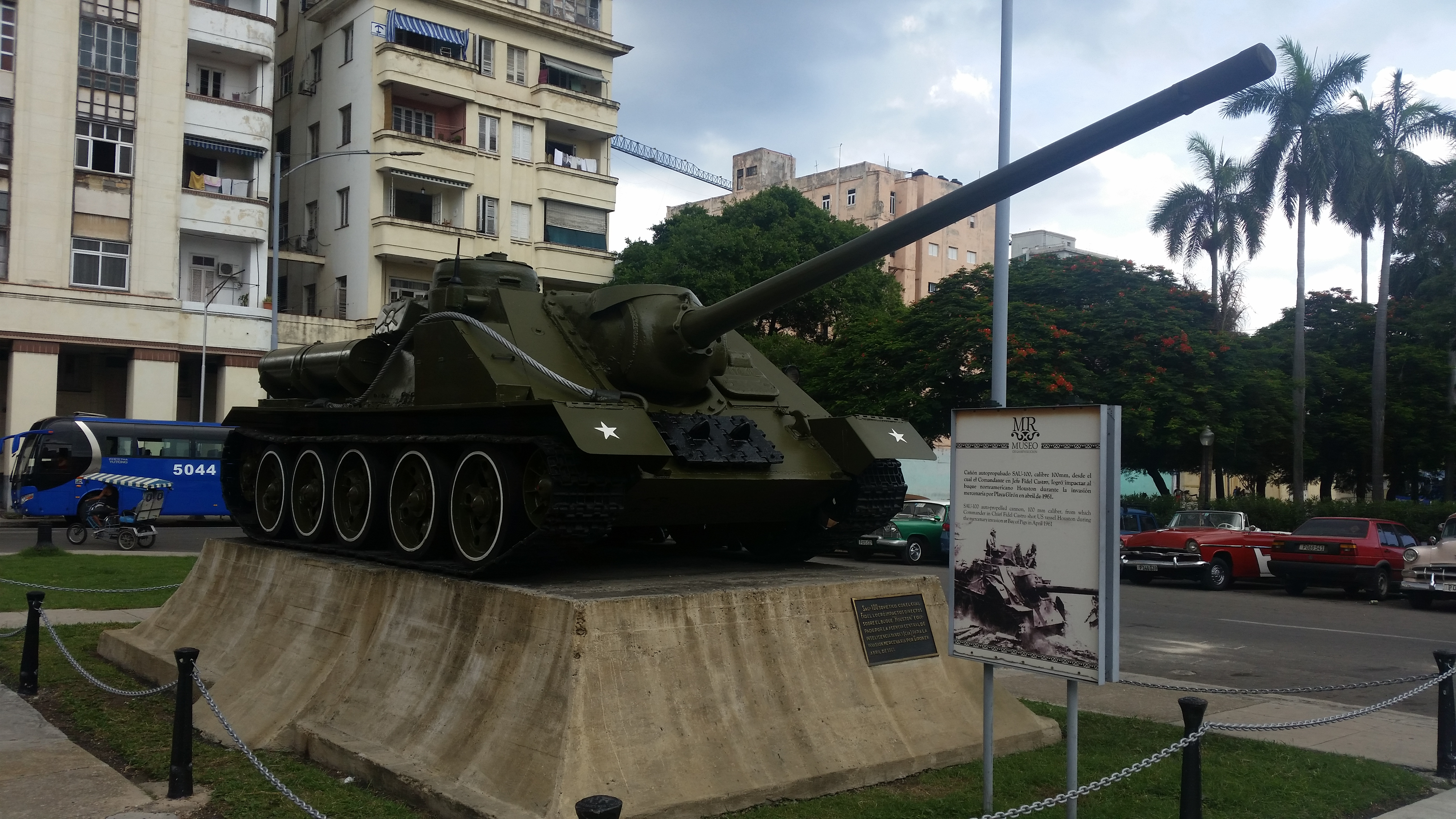 Sau100-tank van Fidel Castro